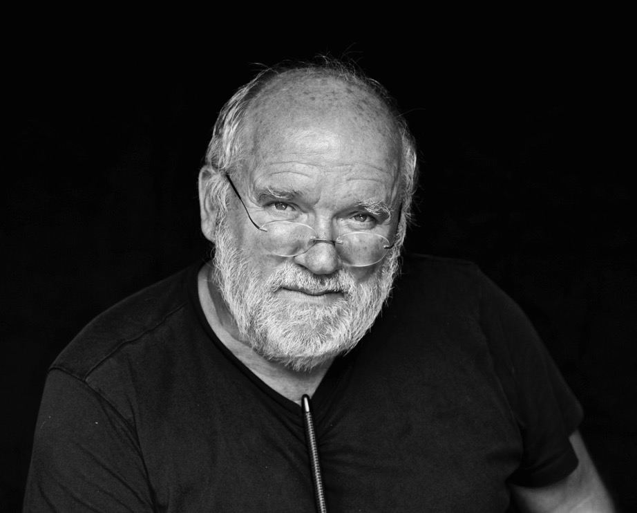 Peter Lindbergh 2015